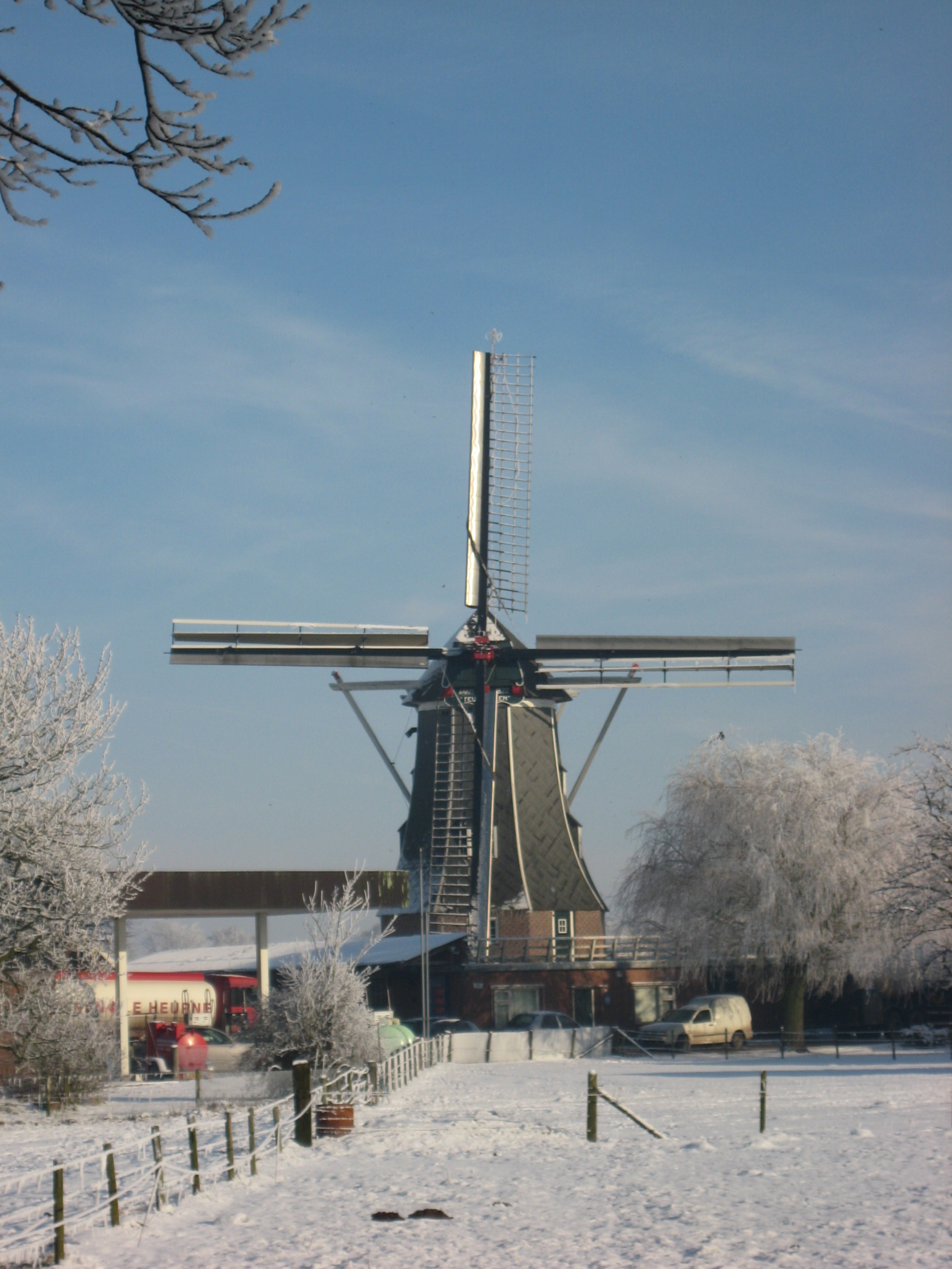 De Teunismolen